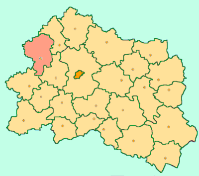 Orel Oblast map by Al Silonov Карта районов Орловской области